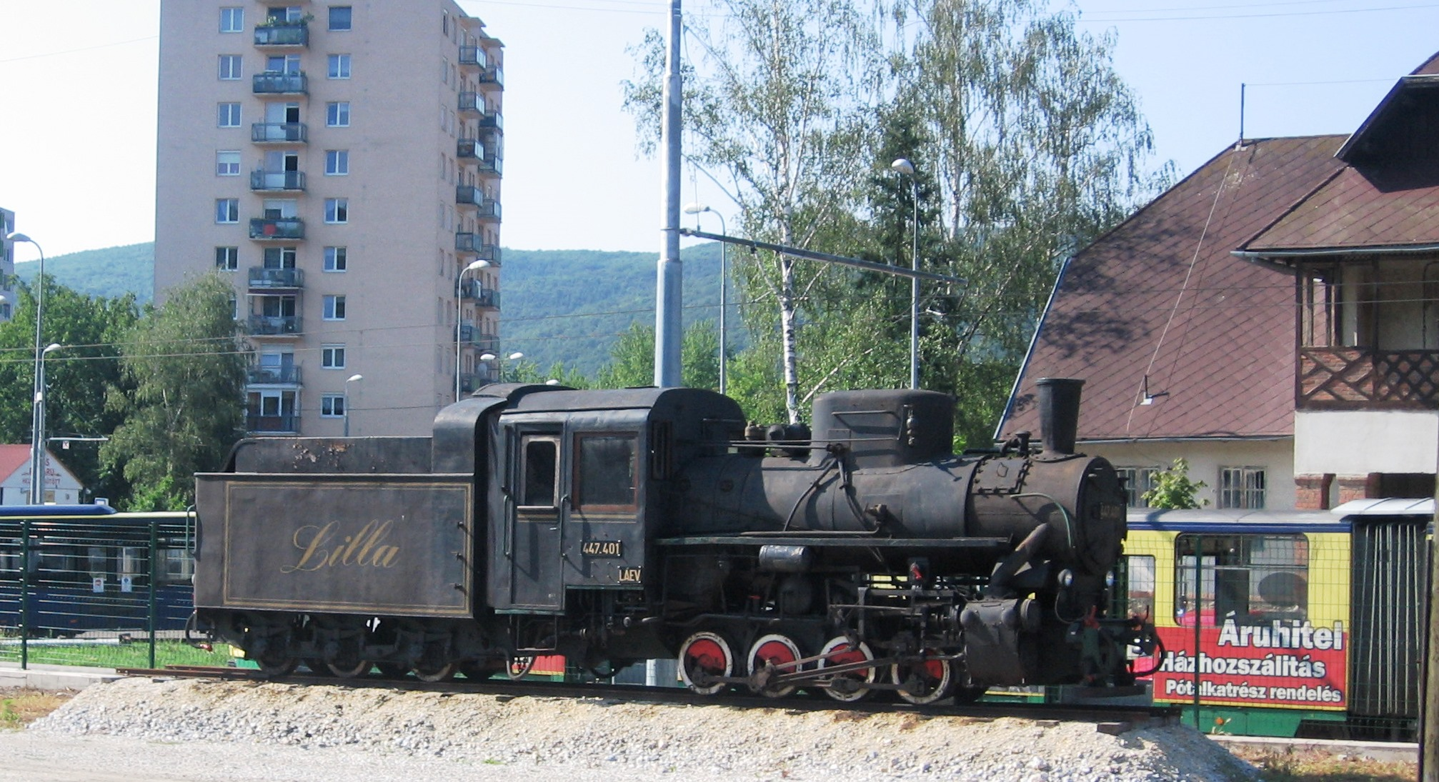 Lilla gőzmozdony Felső-Hámorban kiállítva. A kép készítésekkor új kazánra volt szüksége, így nem üzemelhetett, kiállították.